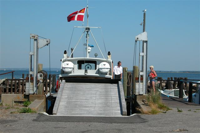 Postbåden Hjortøboen